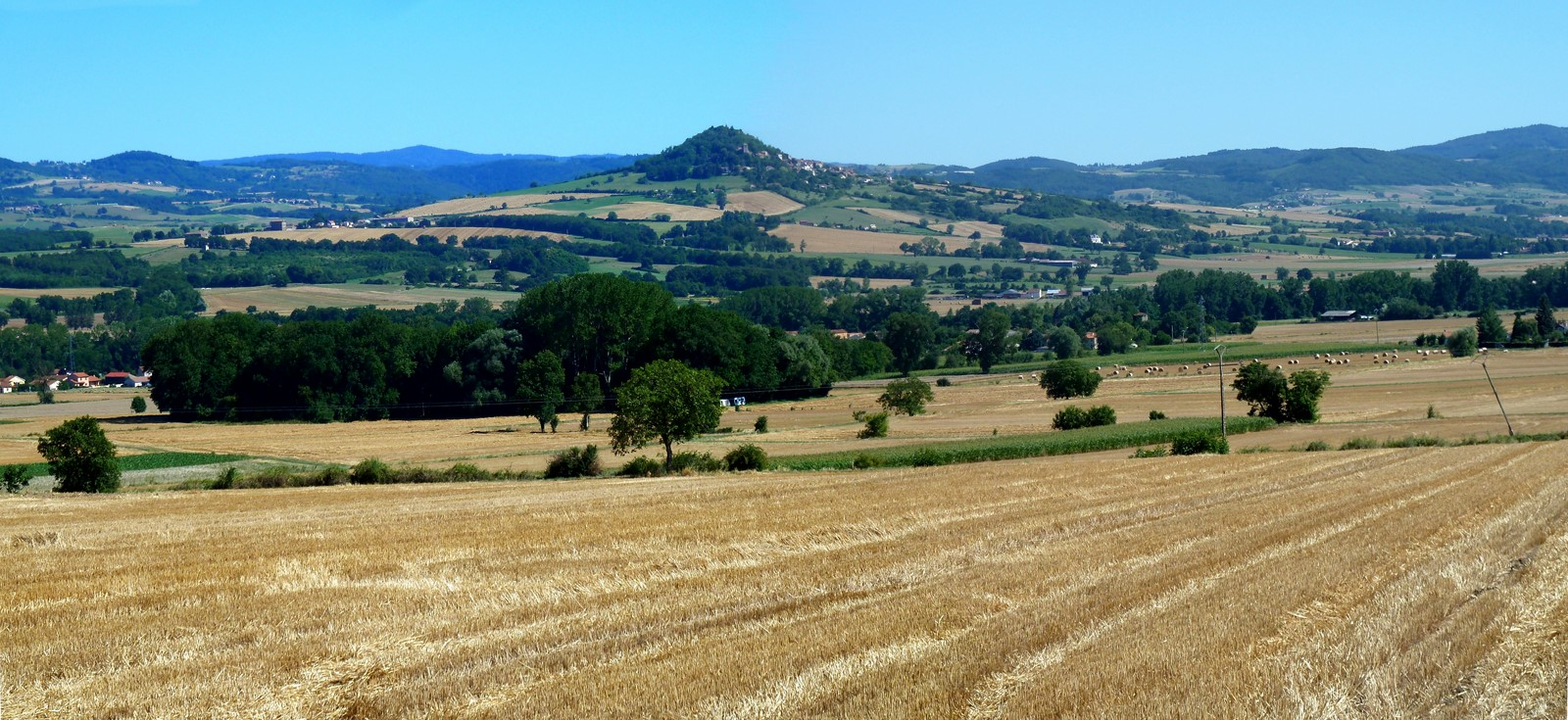 Aperçu de la limagne d'Issoire vers les Domeries - Aulhat-Flat (63)